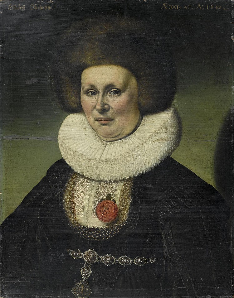 Porträt Elisabeth von Werdt geb. Andreae (1595—vor 1666), Enkelin des Johannes Piscator.